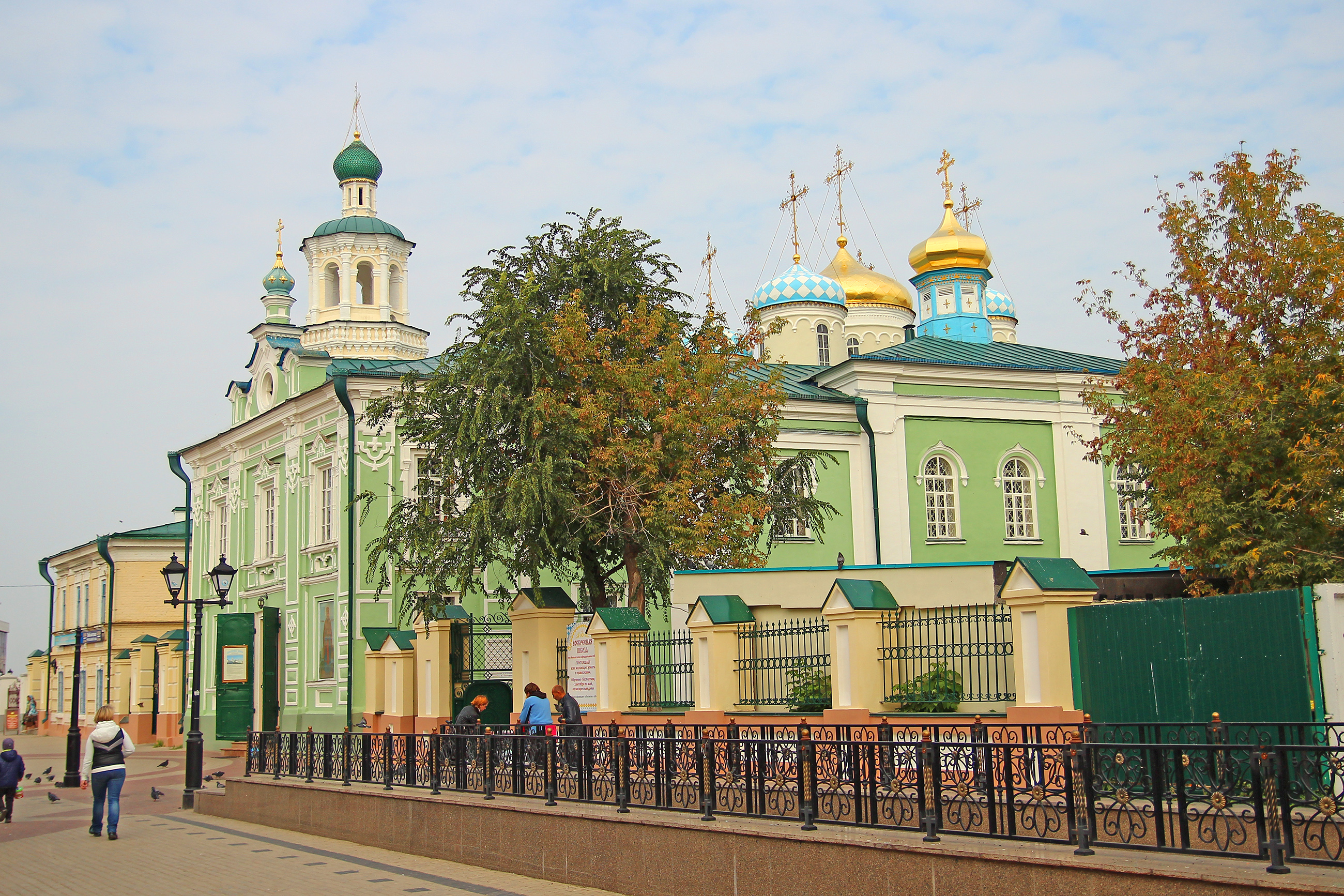 Церковь Николо-Нисская (Республика Татарстан, Казань, Баумана улица, 5)